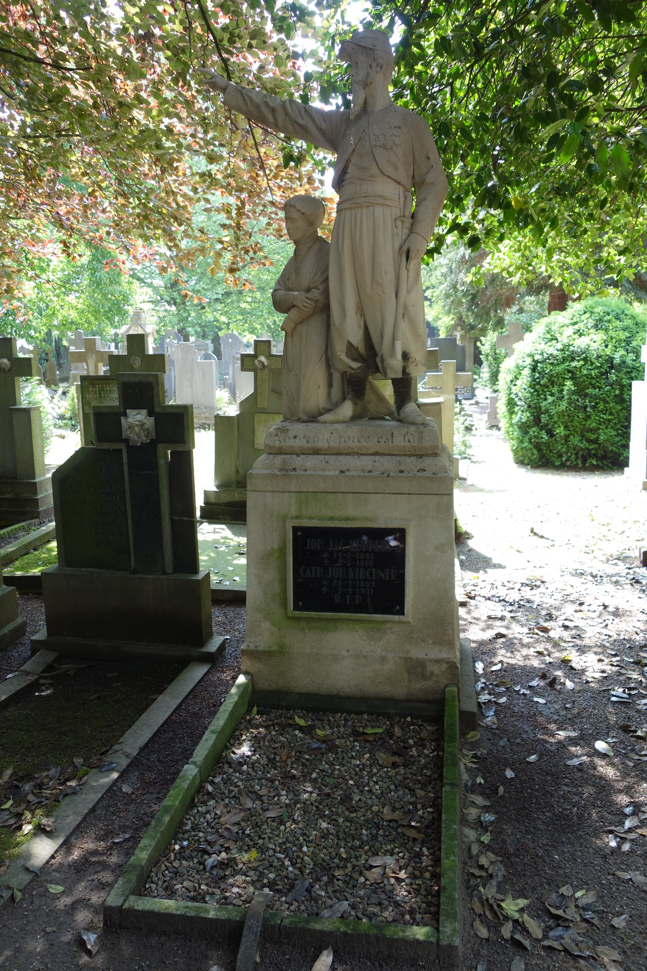 Graf van de zouaaf Küppers op de Oude begraafplaats in Roermond.